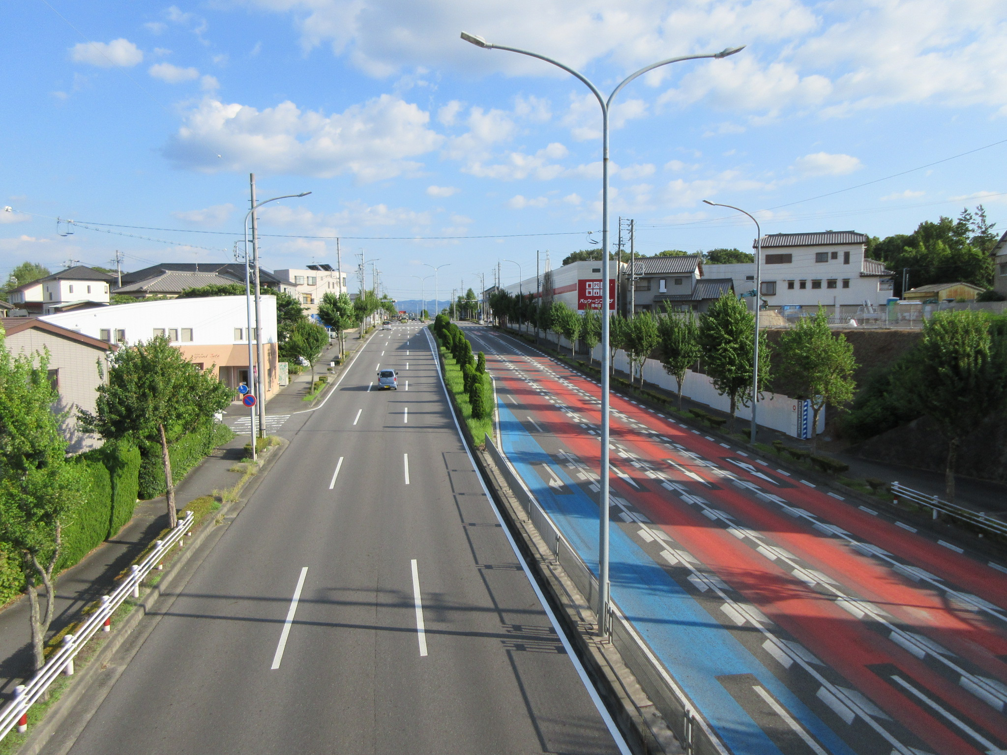 愛知県道26号岡崎環状線。井田町東城交差点から伊賀新町交差点を望む。